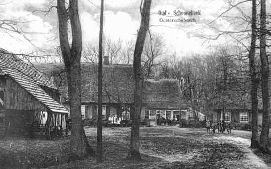 Het Oosterse Bos te Schoonebeek voordat de verharde weg was aangelegd. In het midden een aantal melkbussen op een bussenrek. Personen onbekend